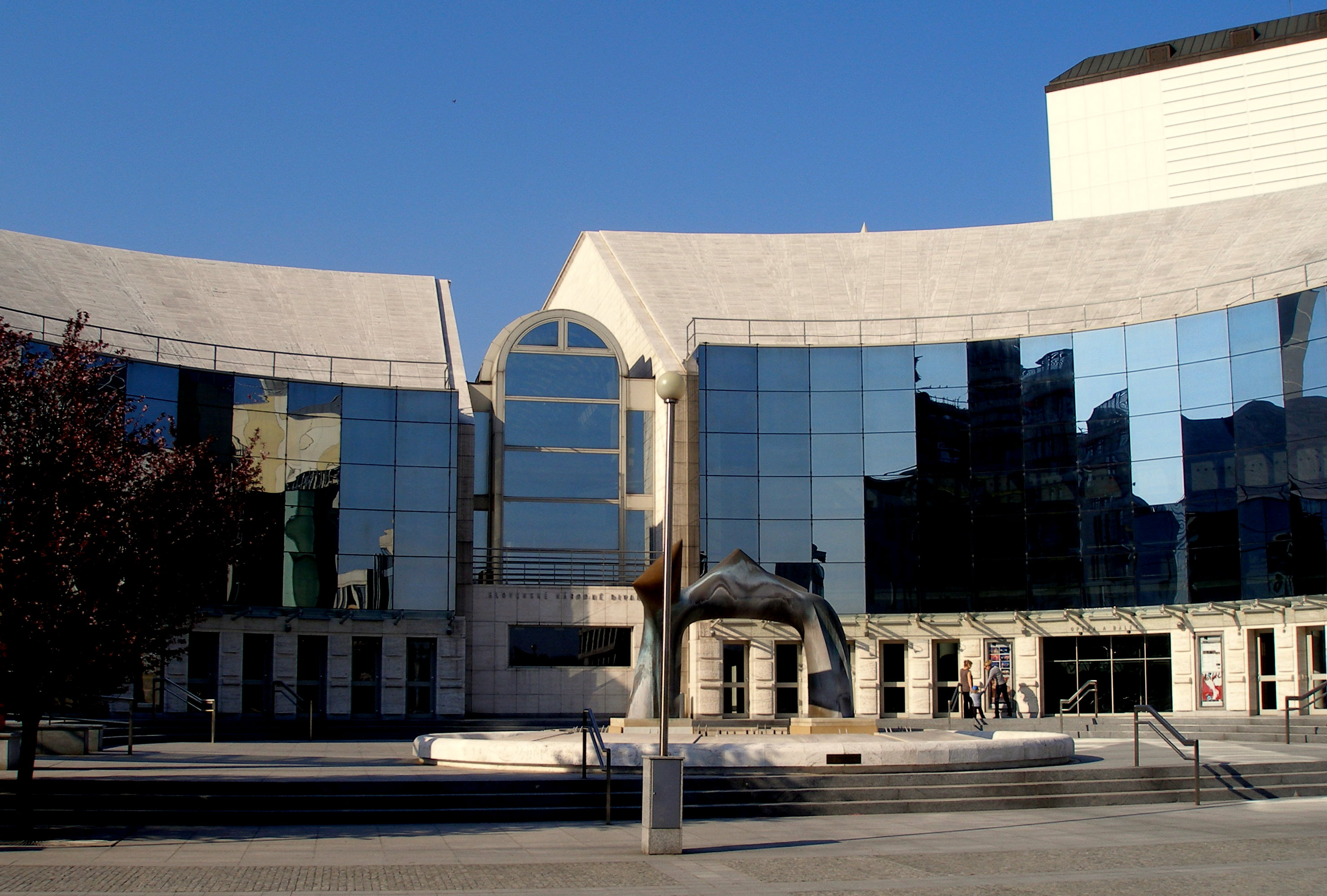 Nová budova Slovenského národného divadla v Bratislave a priľahlé okolie na veľkonočný Veľký piatok 2009